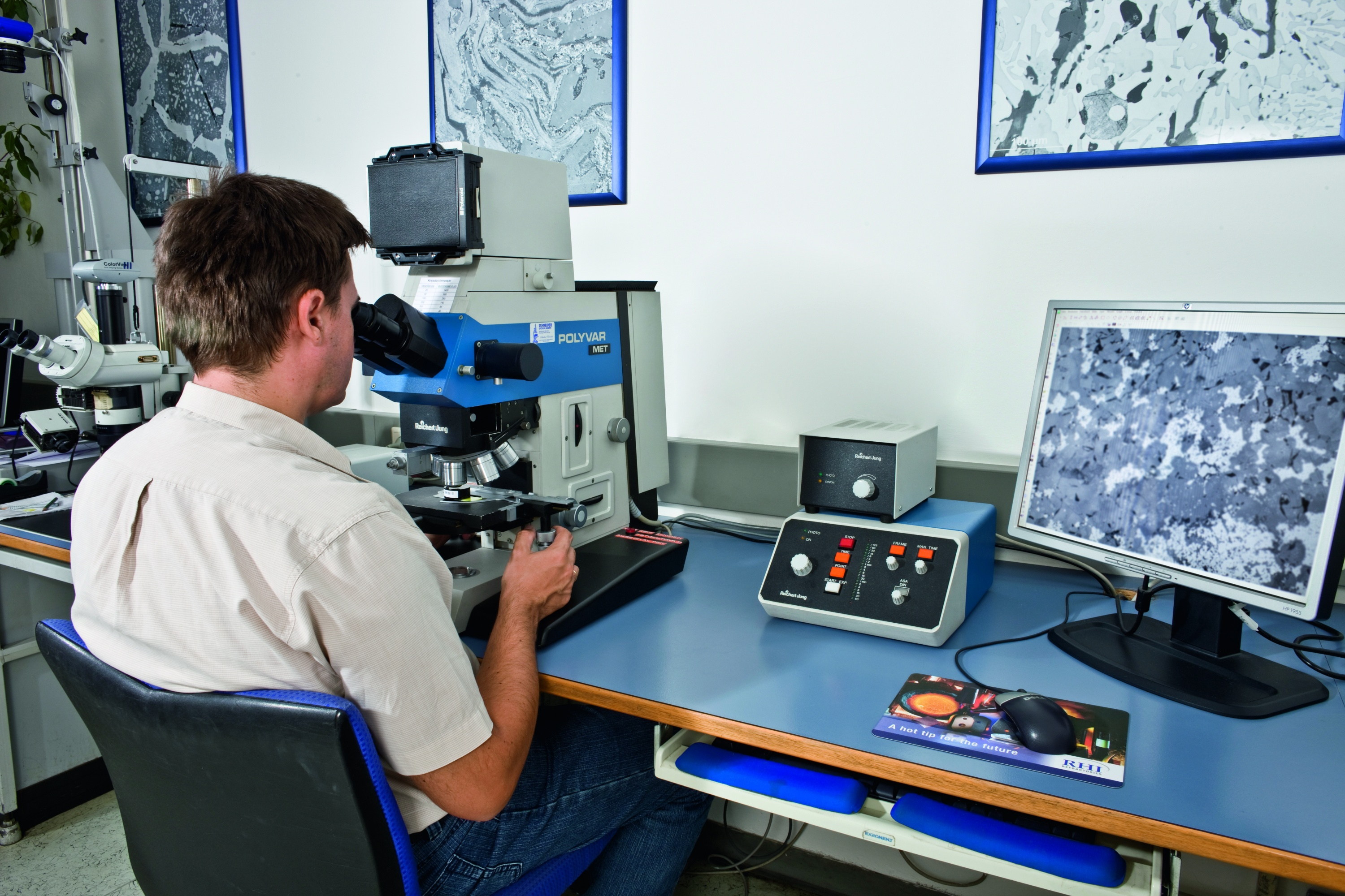 Materialanalyse